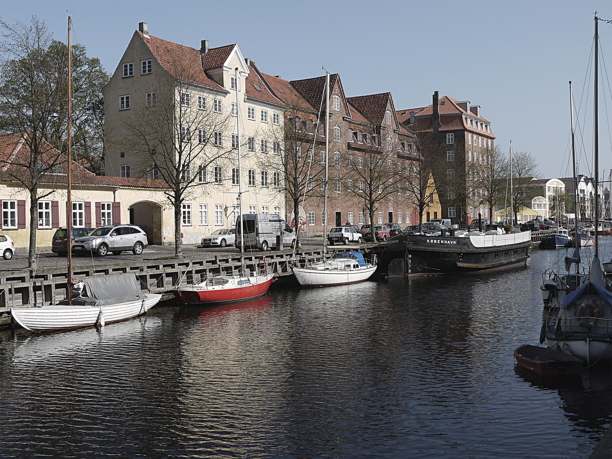 Overgaden Neden Vandet No. 51-53 at Christianshavns Kanal in Copenhagen, Denmark